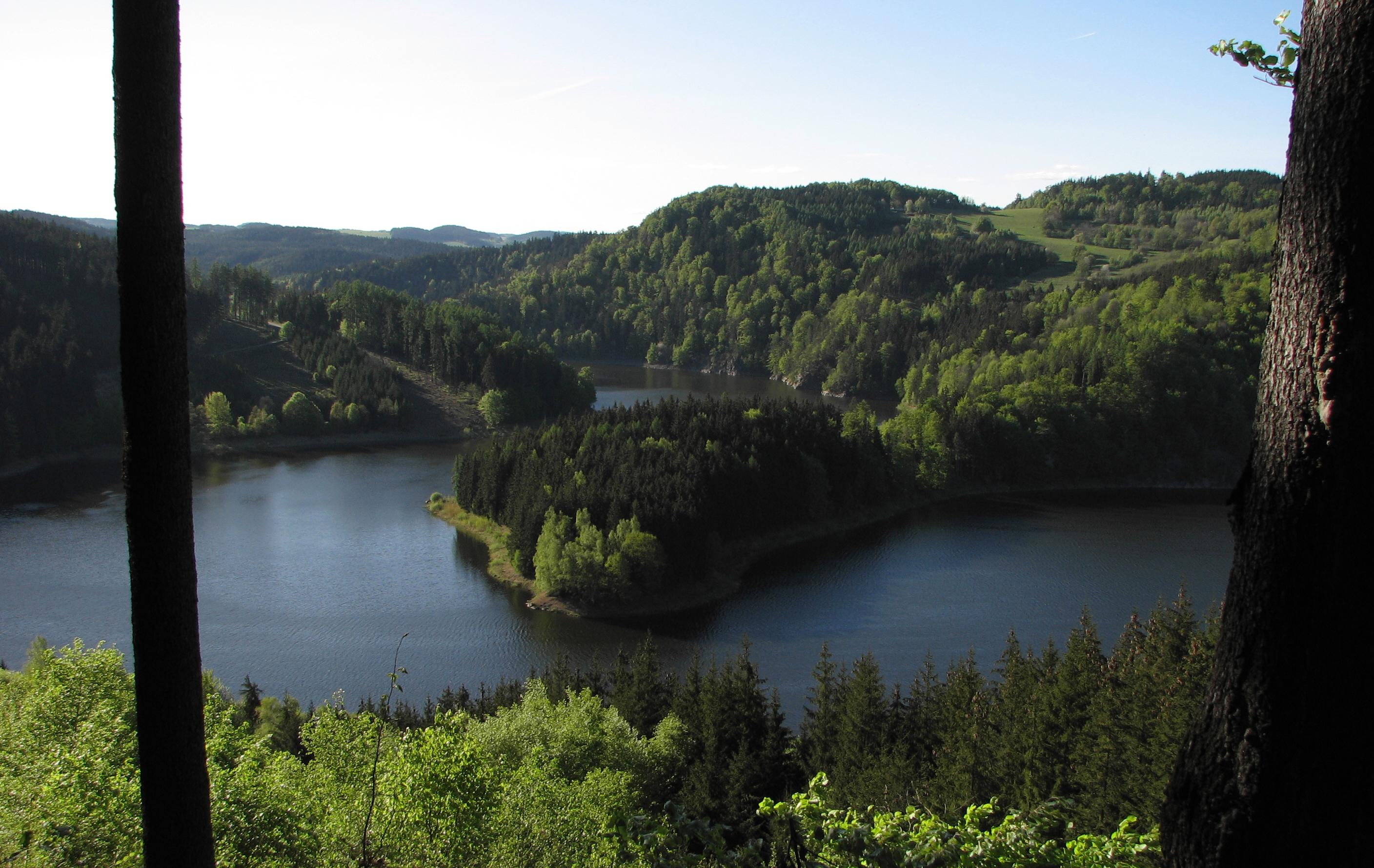 střední část Vírské přehrady